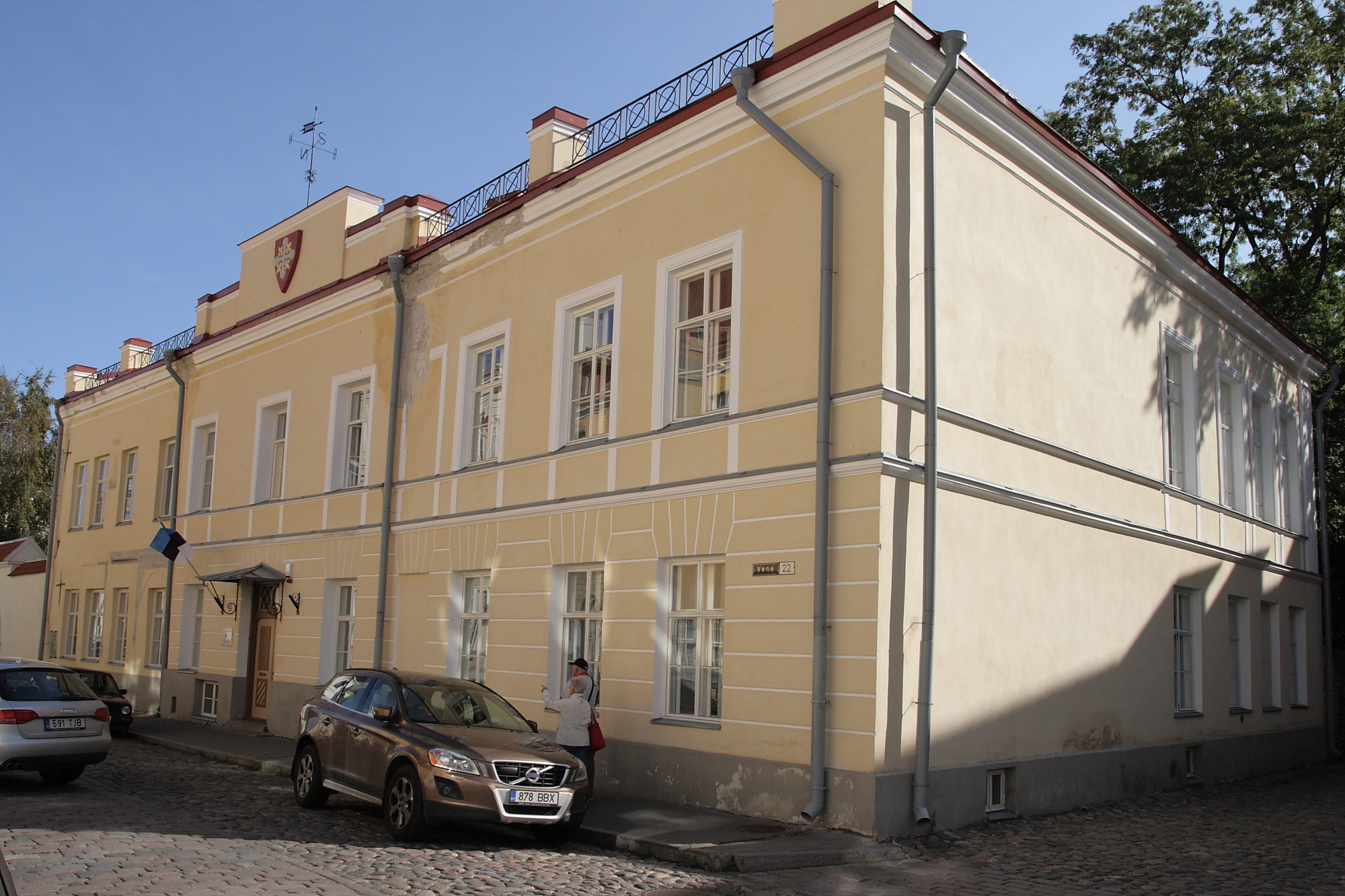 Tallinna Kreiskooli (1832-87) ja Tallinna Linnakooli (1917.aastani) hoone